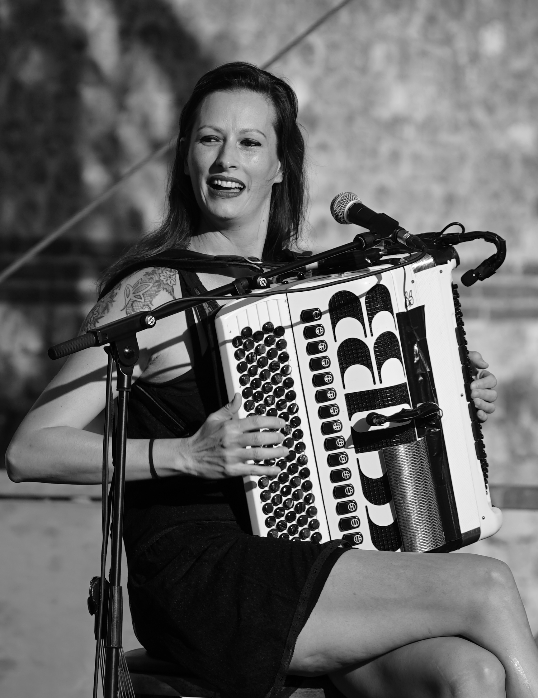 en concert à Reims.